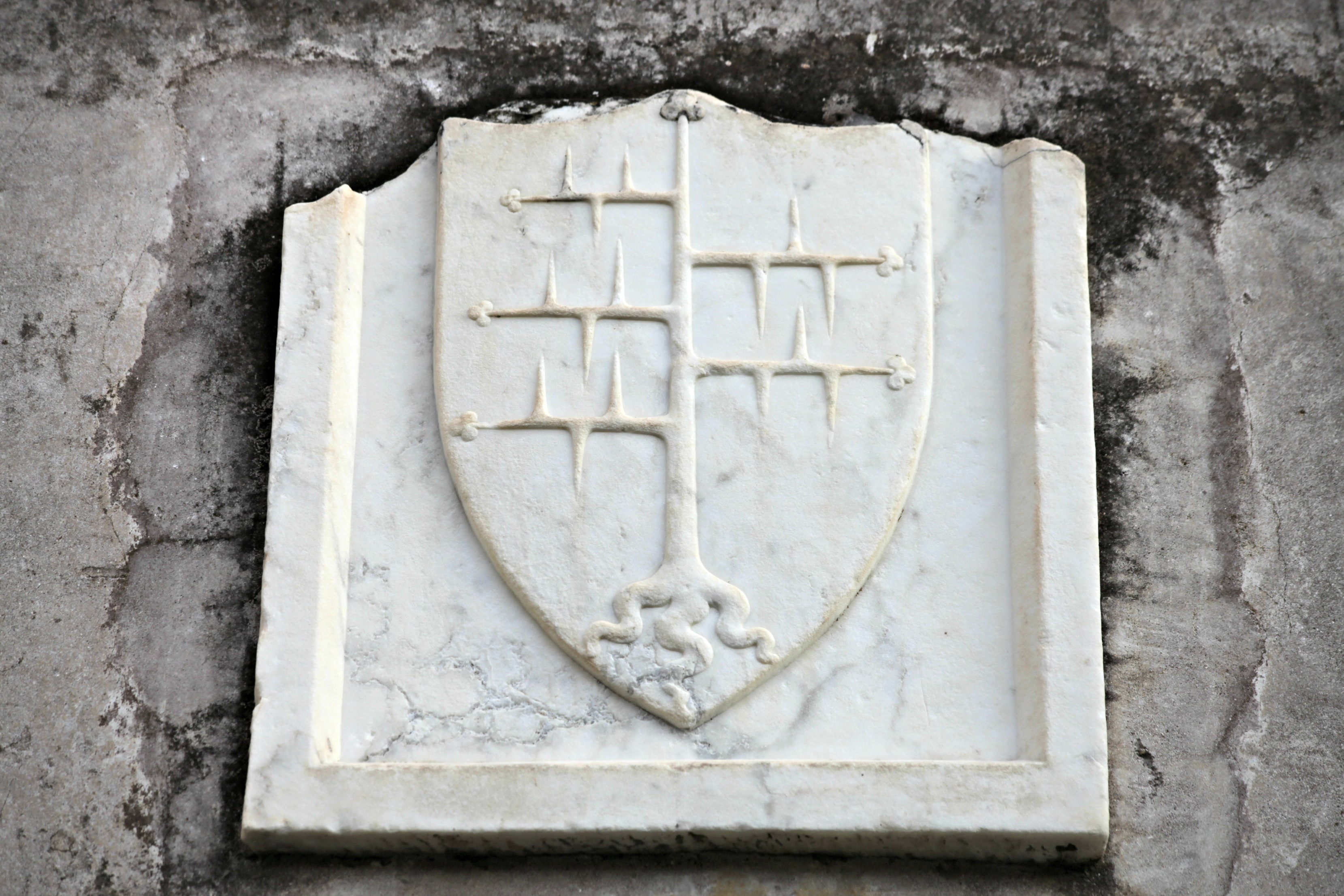 Stemma dei Malaspina dallo Spino Secco